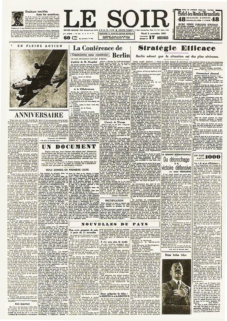 Le Faux Soir publié par la résistance belge, le 9 novembre 1943